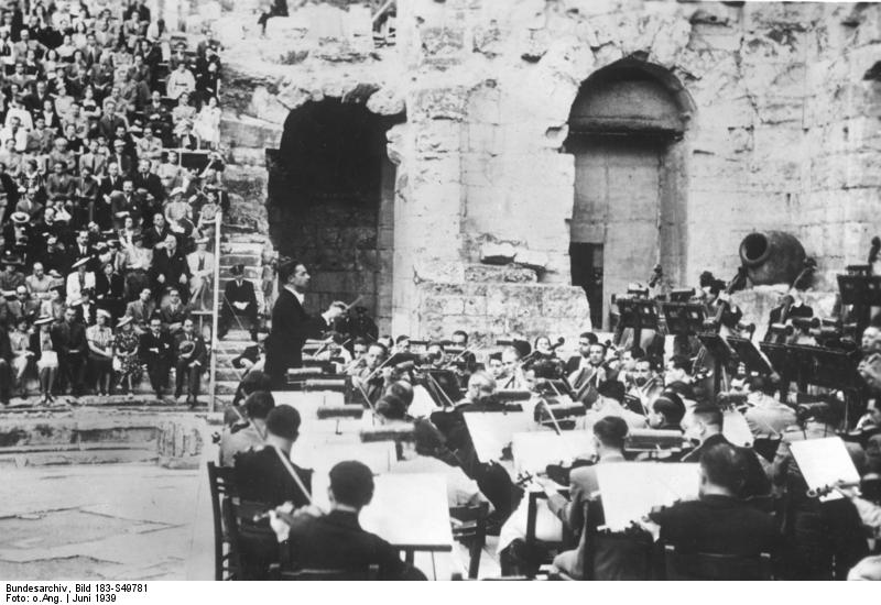 Athen, Herodes-Attikus-Theater Generalmusikdirektor von Karajan dirigiert im Athener Odeon Das erste Konzert der Sommersaison des Athener Odeon fand in Gegenwart des griechischen Königs mit seiner Familie und zahlreicher Ehrengäste unter der Stabführung von Generalmusikdirektor herbert von Karajan von der Berliner Staatsoper statt. Schauplatz dieses festlichen musikalischen Ereignisses war das antike Herodes-Attikus-Theater unterhalb der Akropolis, in das unser Bild einen Blick während des Konzertes gewährt. Scherl-Bilderdienst Abgebildete Personen: Karajan, Herbert von: Dirigent, Generalmusikdirektor der Wiener Staatsoper, Österreich